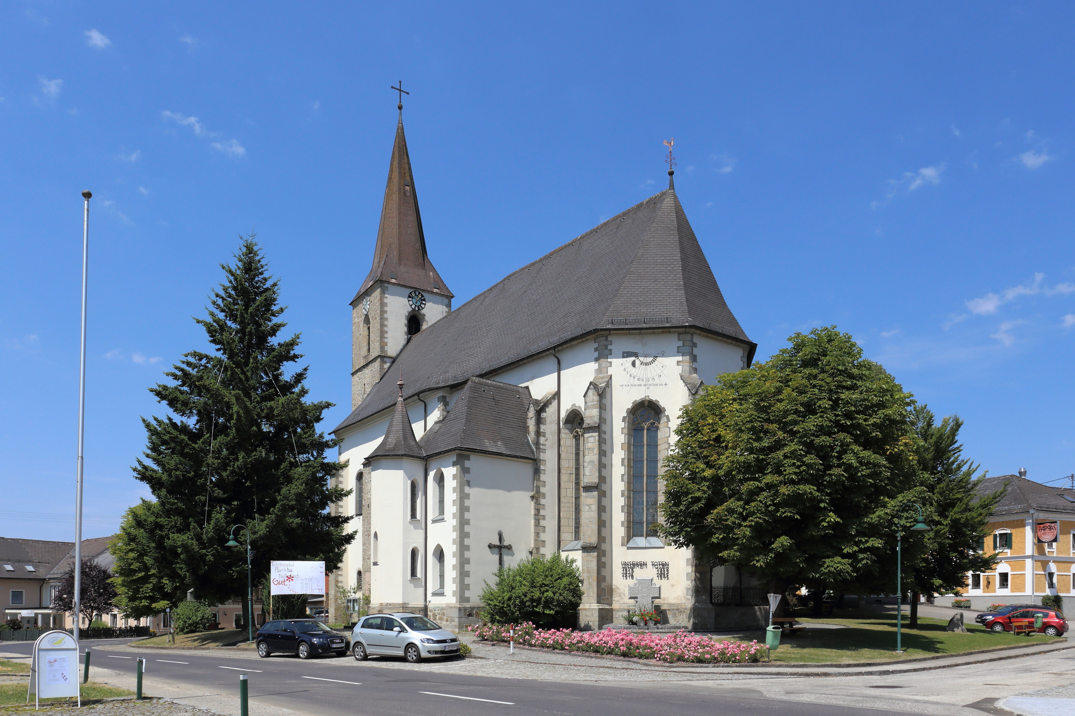 Katholische Pfarrkirche hl. Margarita in der oberösterreichischen Marktgemeinde Natternbach. Ein spätgotischer einschiffiger Sakralbau mit neugotischer Einrichtung. Das barocke Gewölbe des Langhauses stammt aus dem Ende des 18. Jahrhunderts.